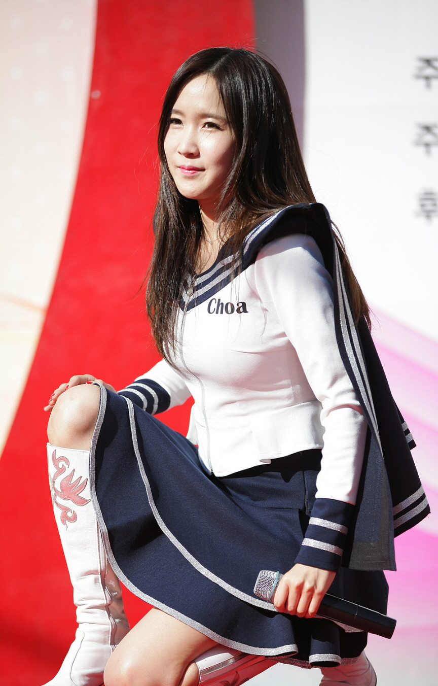 크레용팝(Crayon Pop) 도시 꼬마들의 행복한 축제 티브로드 원음방송